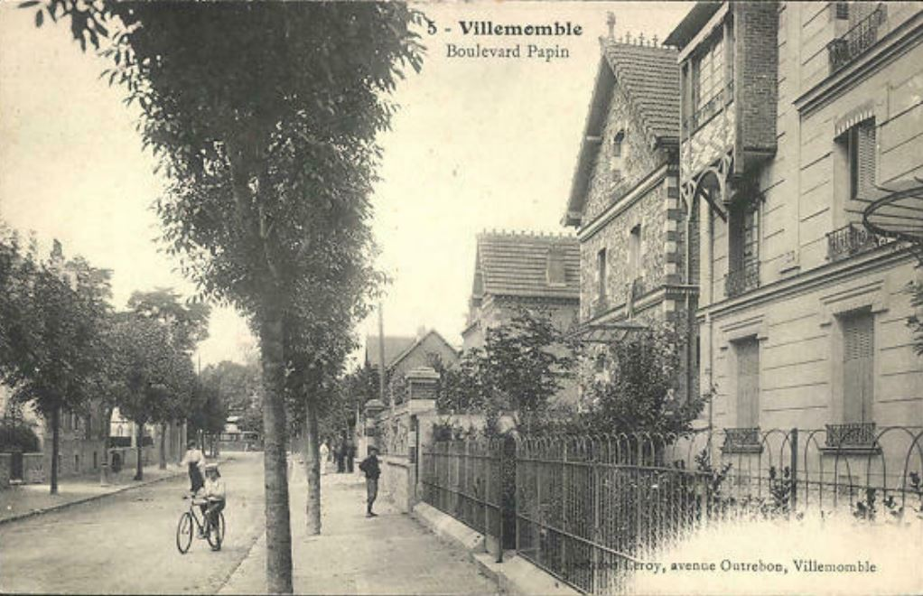 Villemomble.Boulevard Papin.Bicyclettes